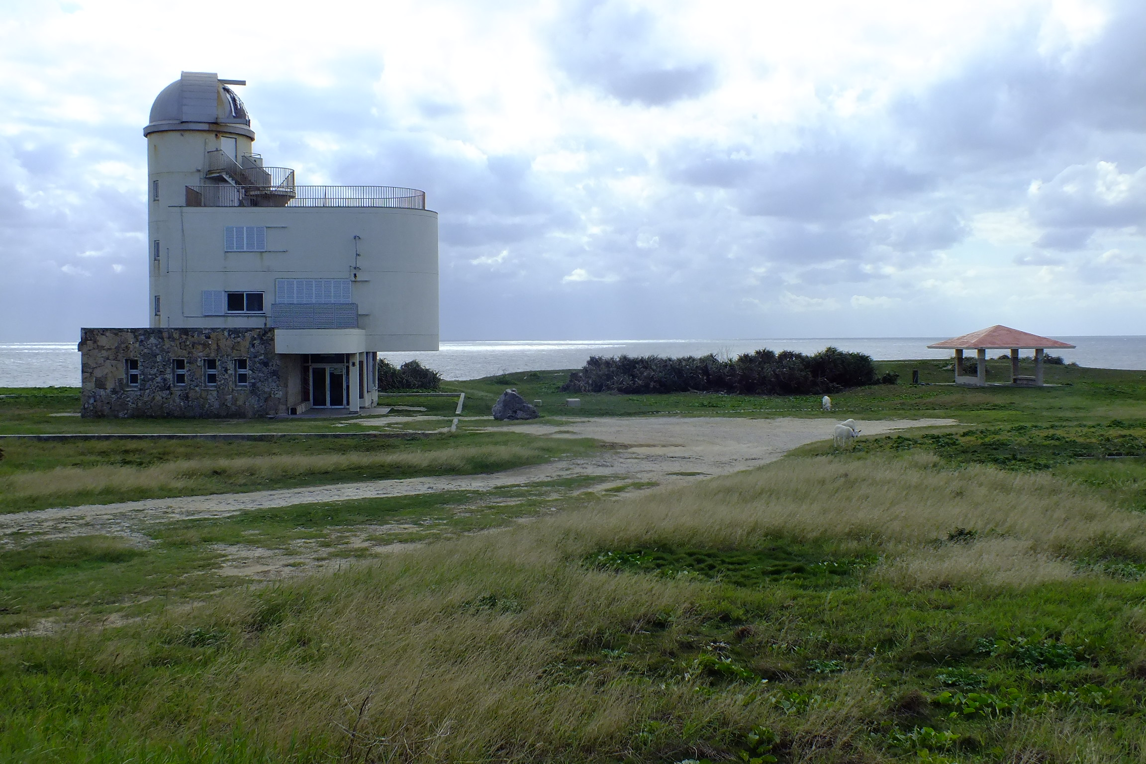 2015-12-17 Haterumajima,Takanazaki 高那崎